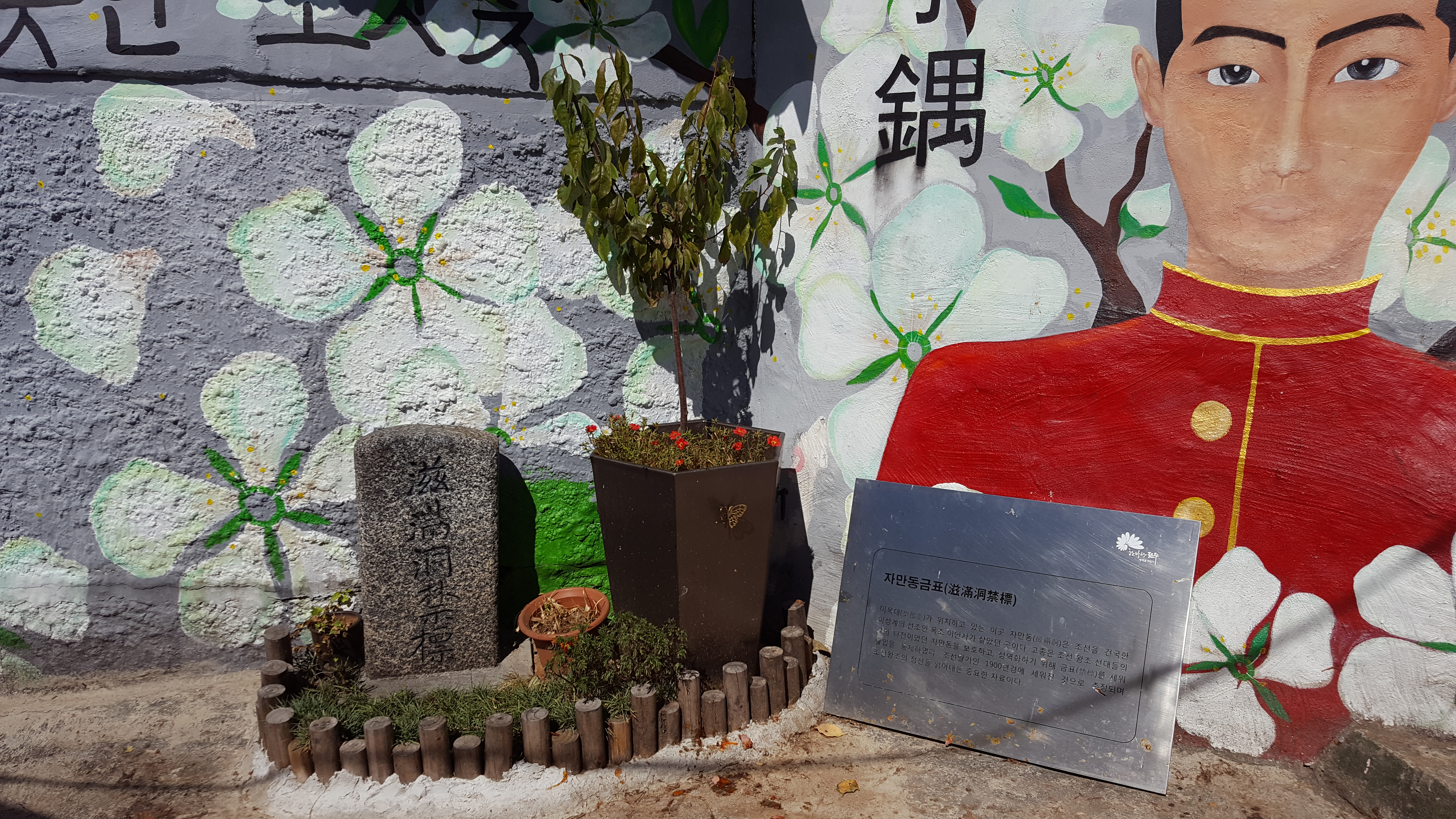 태조 이성계의 4대조 목조(穆祖) 이안사(李安社)가 살았던 곳을 표시한 자만동금표(滋滿洞禁標)이다. 안내판은 담장에 기대어 놓여있으며 이우와 오얏꽃이 그려져있다.